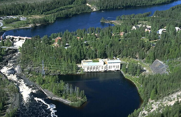 Kraftverket Motiv: Finnforsfallet Nyckelord: Flygbilder, Riksintressen Kategori: Kraftverk Kraftverket.